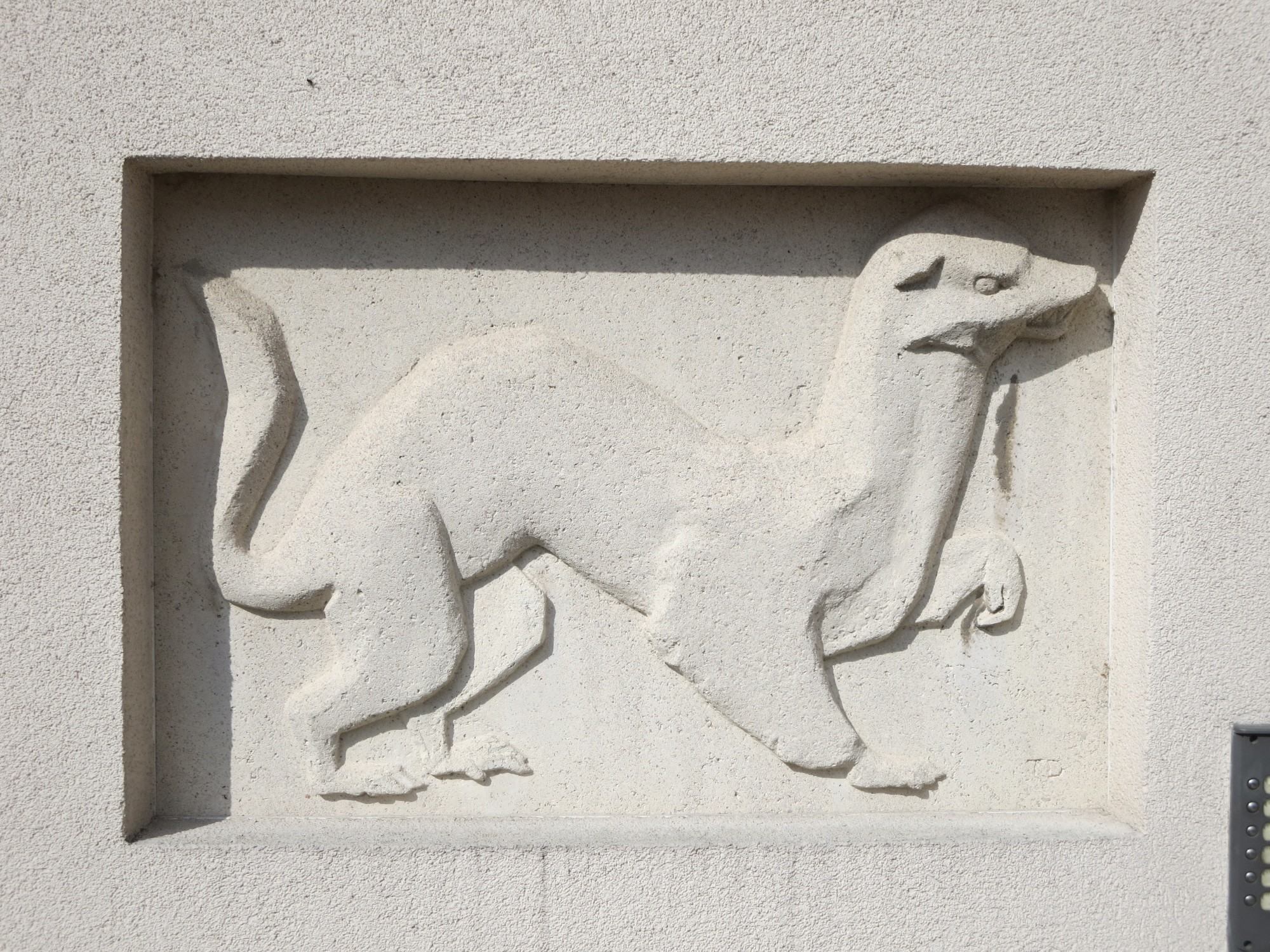 Relief-Hauszeichen Wiesel von Gertrude Diener aus dem Jahren 1957-1959 in der Wohnhausanlage Rußbergstraße 24 Stiege 6, Wien-Floridsdorf This media shows the Vienna residential building (Gemeindebau) with the ID 1505.